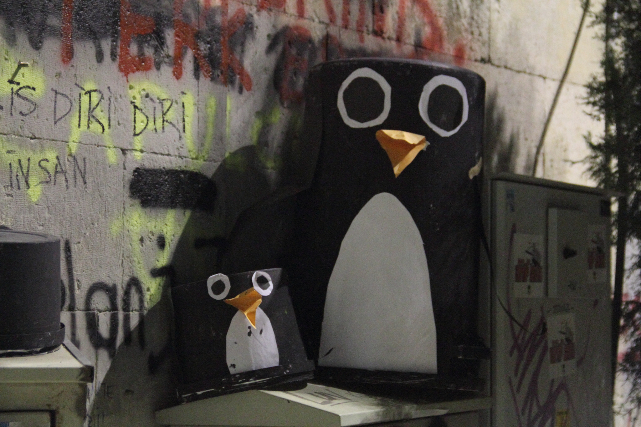 Gezi parkı